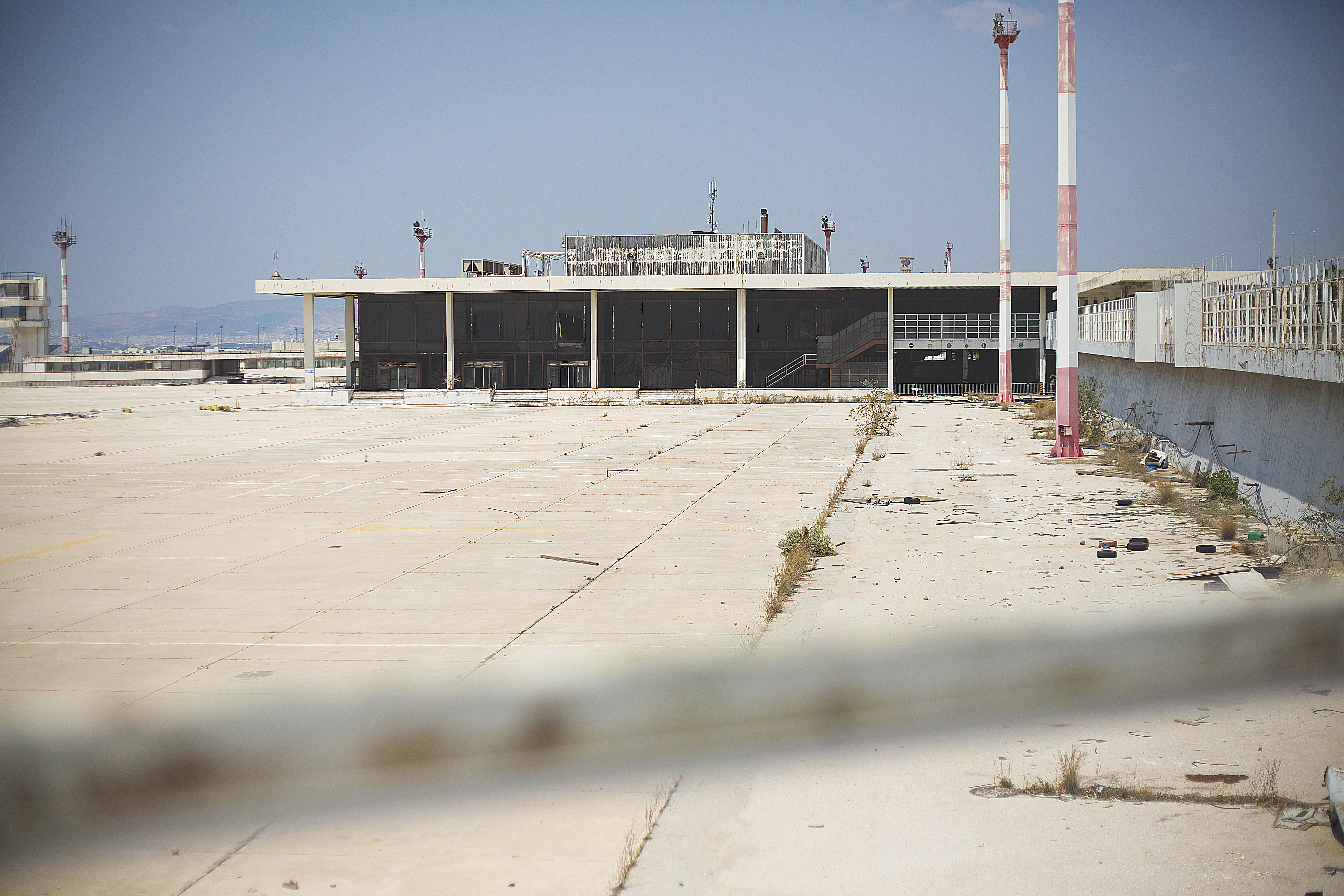 Das Hauptrollfeld des ehemaligen internationalen Flughafens Ellinikon in Athen.